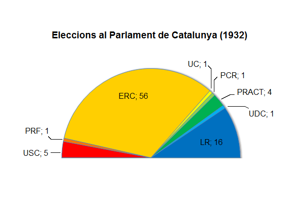 Arc polític al Parlament de Catalunya (1932)